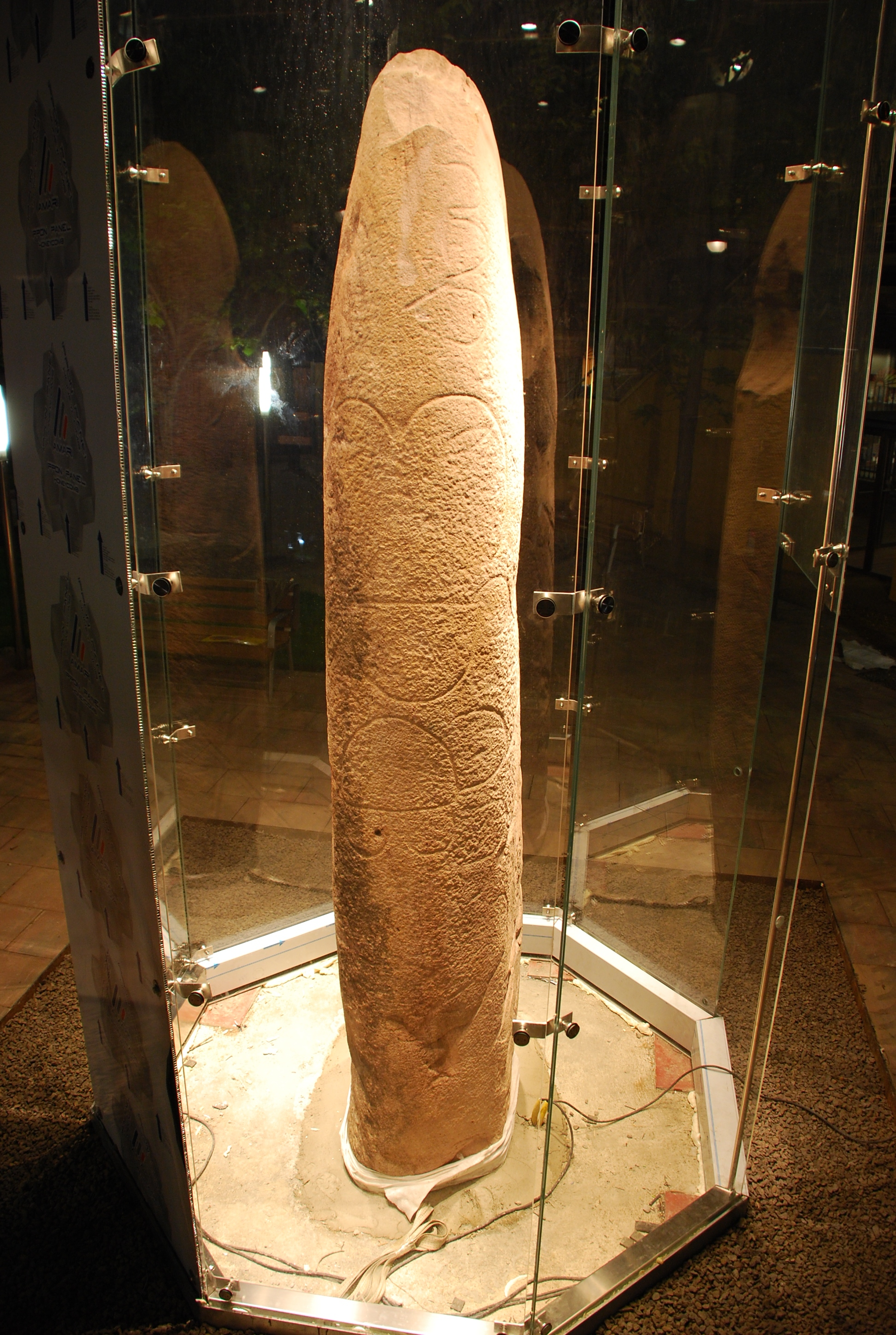 Detall de les decoracions en forma de gravats que té el Menhir de Mollet (Parc de Can Mulà, Mollet del Vallès, Vallès Oriental).